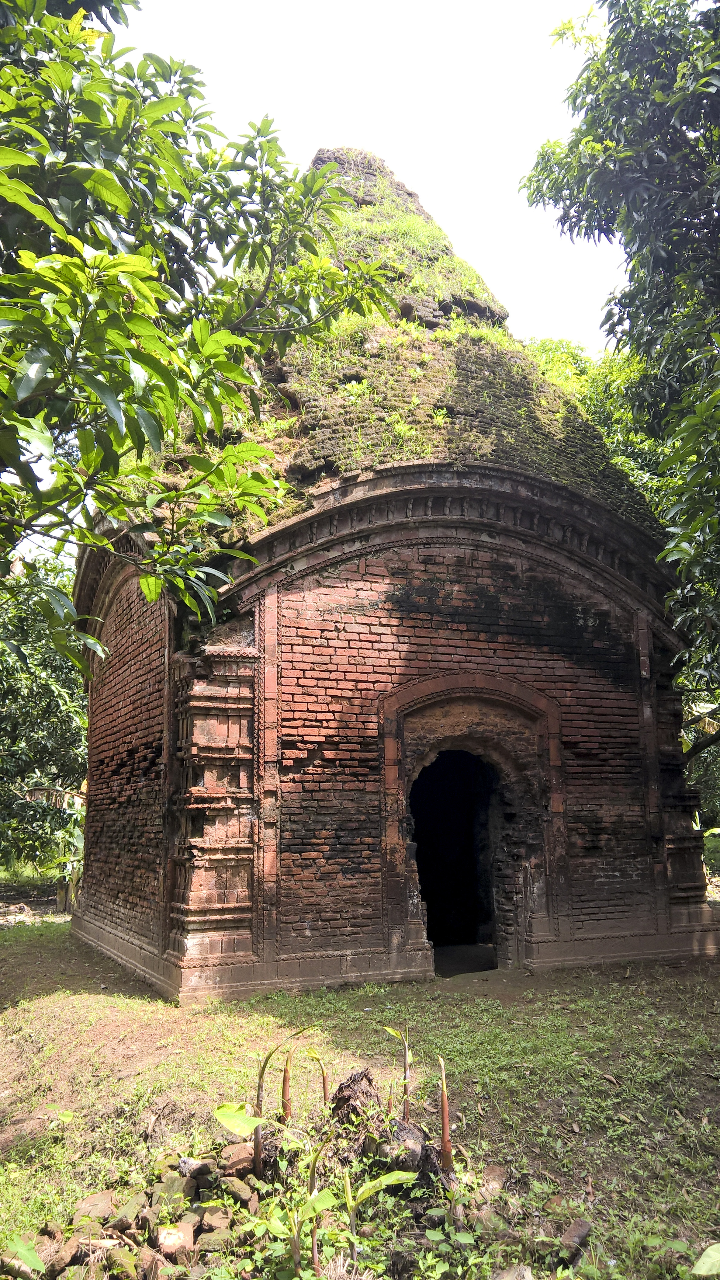 কৃষ্ণপুর গোবিন্দ মন্দির, পুঠিয়া, রাজশাহীর অন্যতম প্রত্নতাত্বিক স্থাপনা হিসেবে বিবেচিত। স্থানীয়ভাবে এটি সালামের মঠ নামেও পরিচিত।